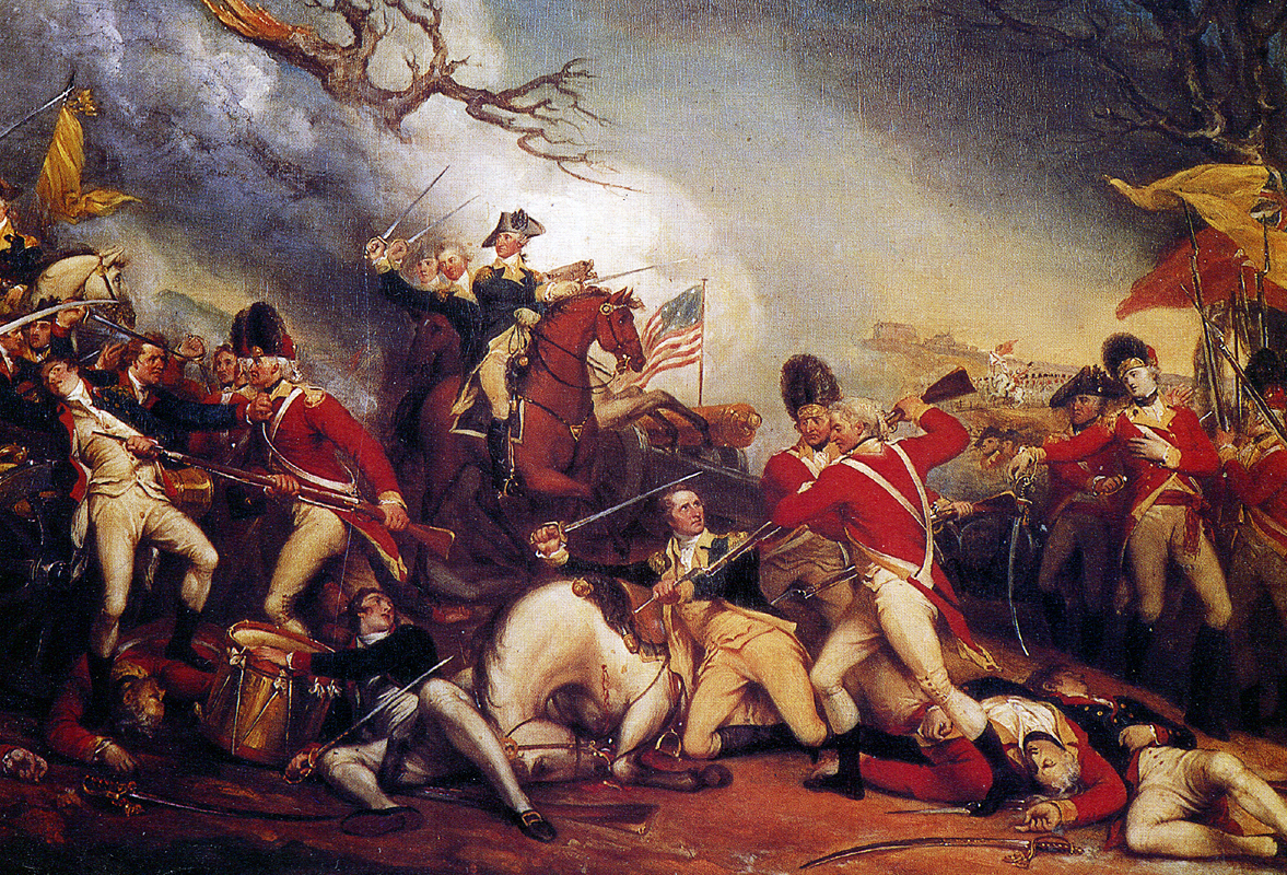 Битва при Принстоне.